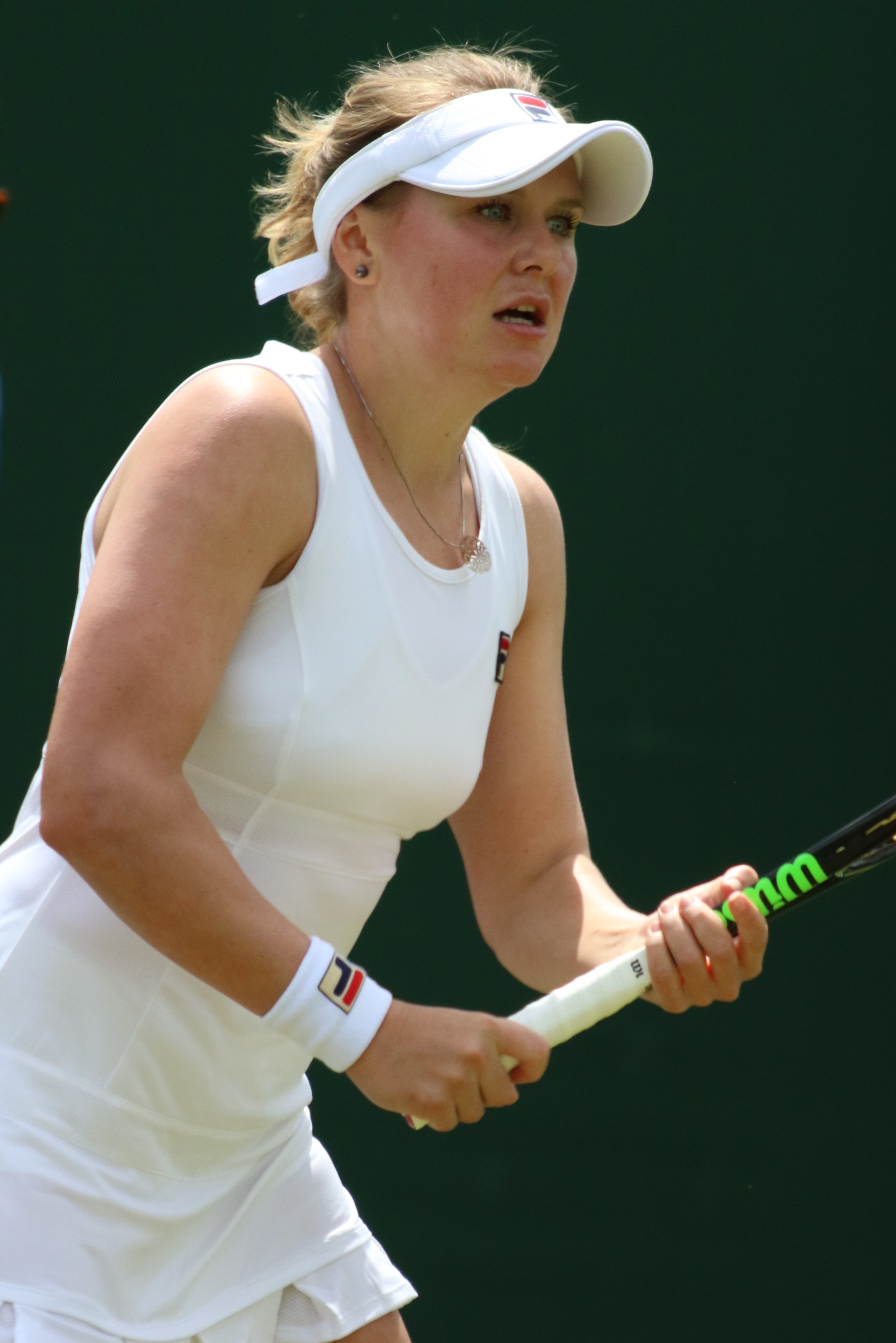 Kozlova WM19 (13)